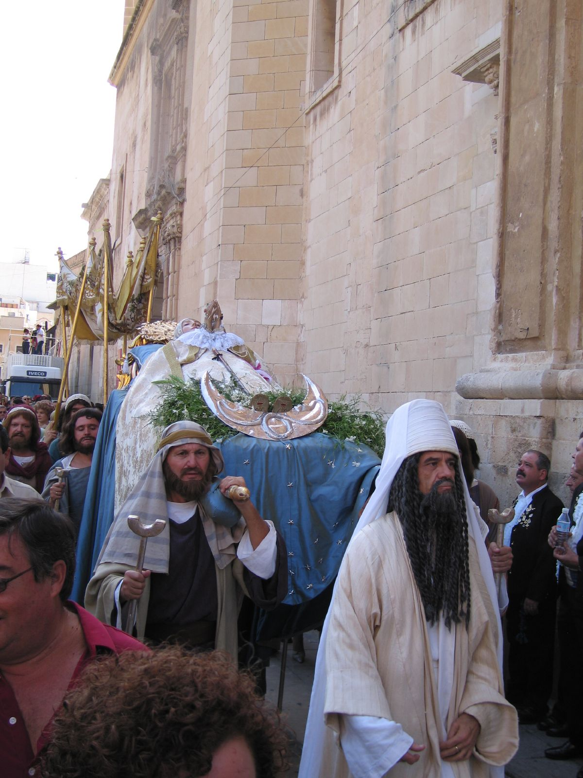 Elx, Alacant.